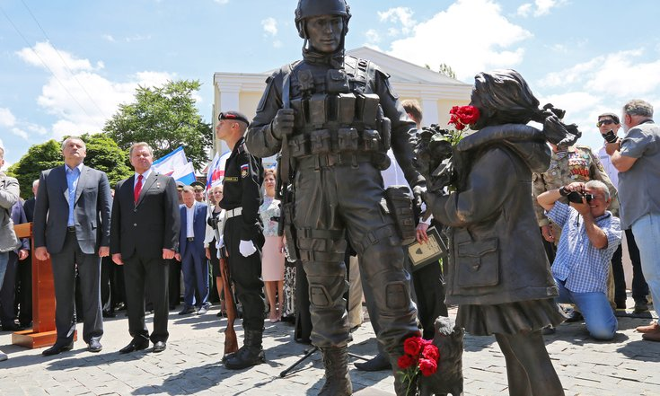 Церемония открытия памятника «Вежливым людям» в Симферополе